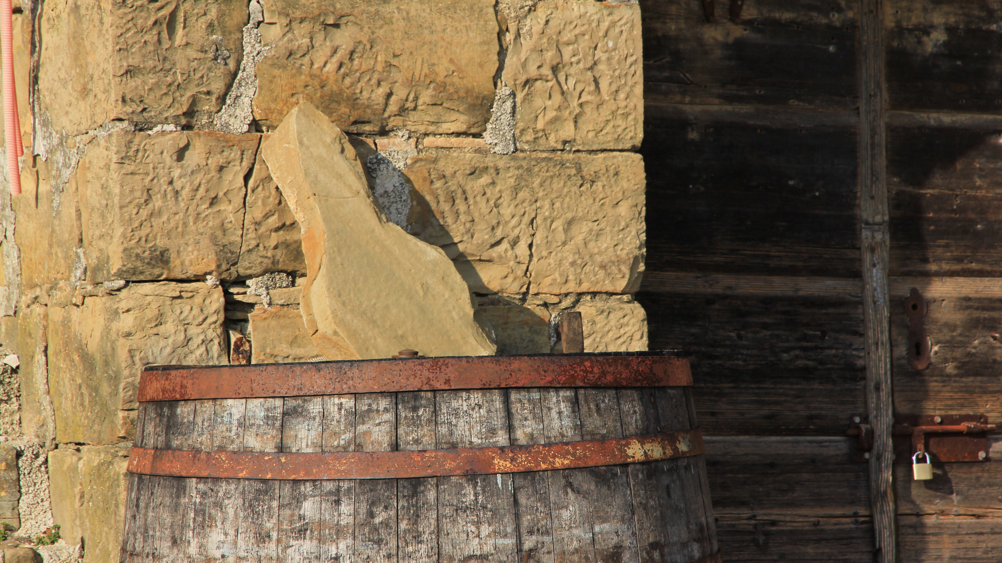 Puče - zaselek Pribci